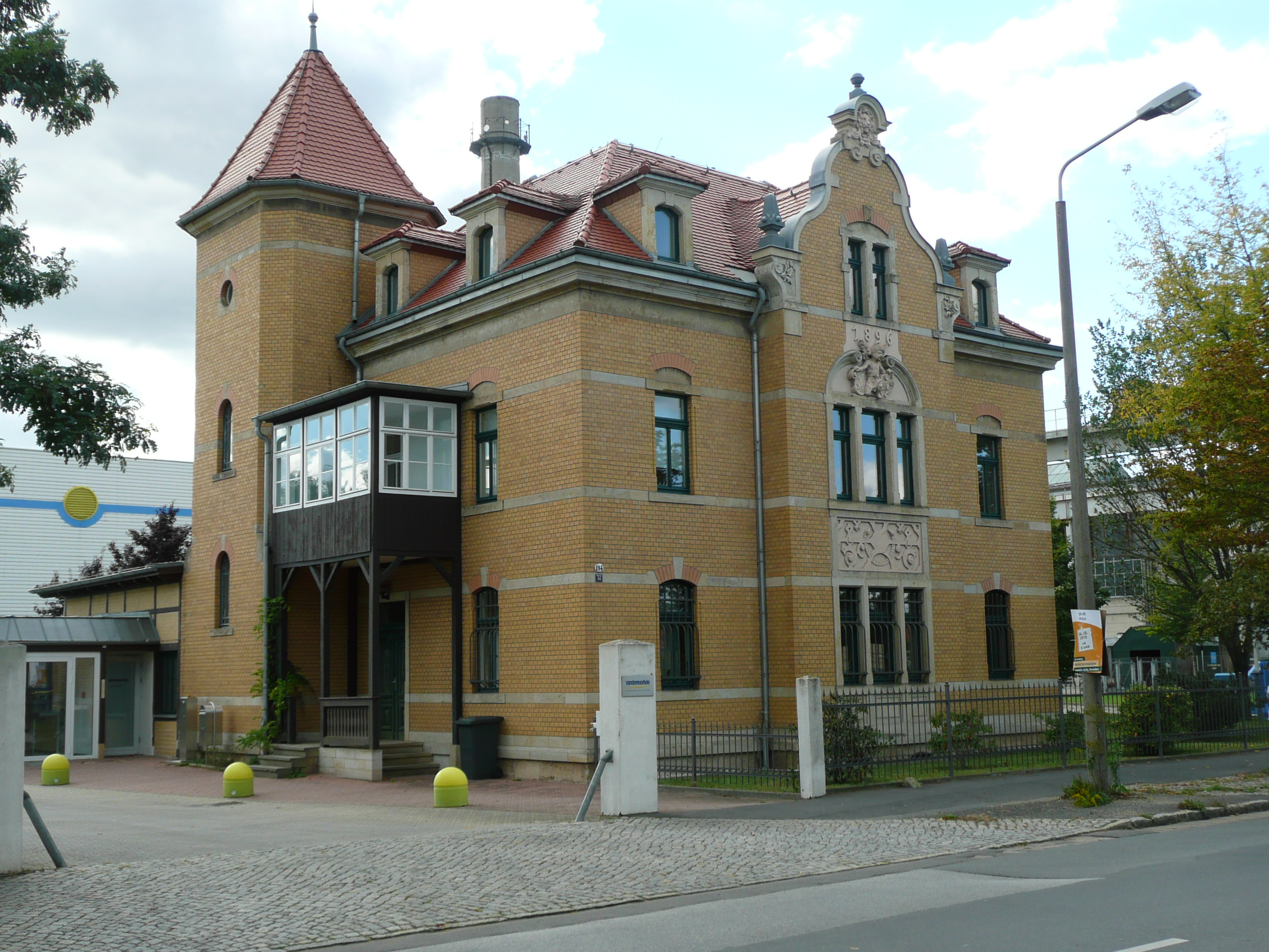 Wohnhaus Leuben Pirnaer Landstraße 194